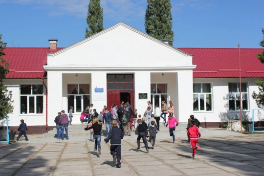 Liceul Teoretic "Vlad Iovita" din Cocieri